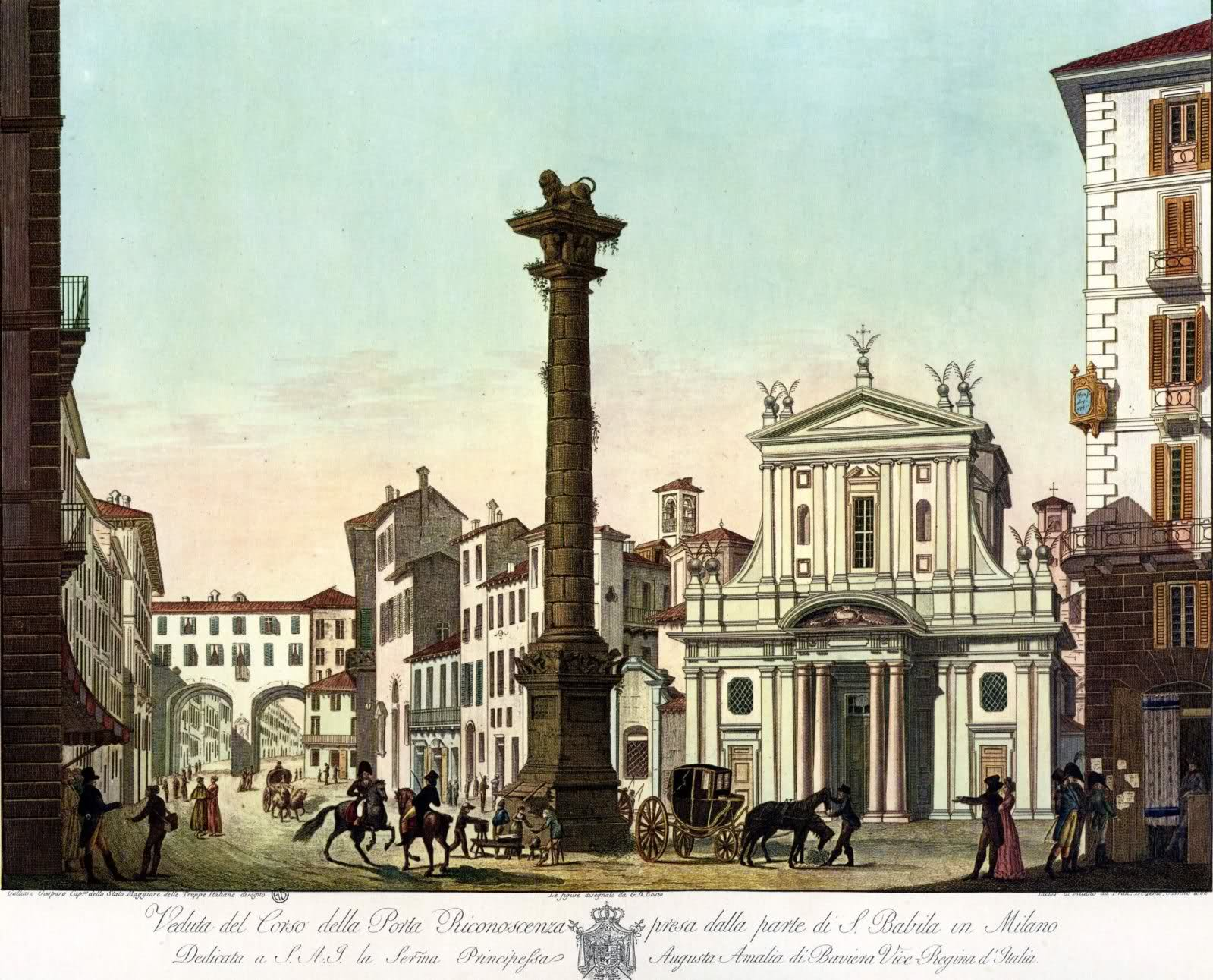 Milano, corso di Porta Orientale, oggi di Porta Venezia: in primo piano la colonna dl leone, a destra è visibile il campanile e parte della demolita chiesa di San Romano; a sinistra svetta il campanile del demolito oratorio di Santa Martaa